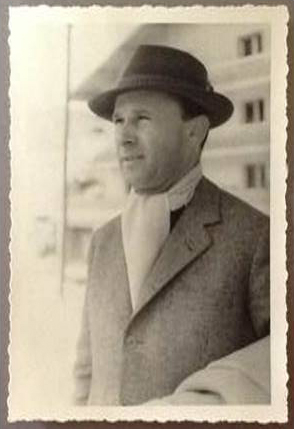 Bernard Blossac